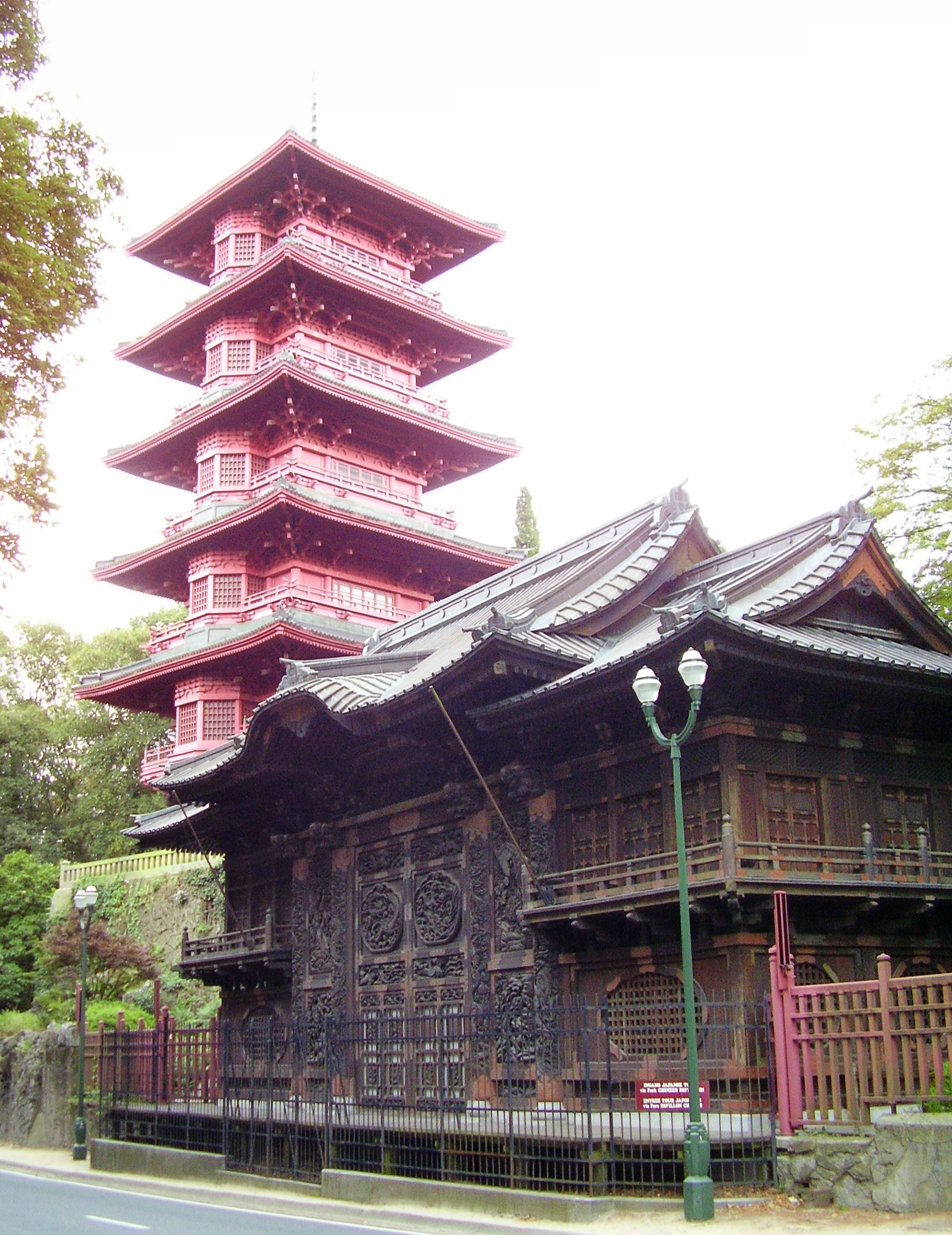 Description: La Tour japonaise, musée d'Extrème-orient, Laeken (Bruxelles) Author: User:Ben2 Date of creation: 10 août 2006 Source: Photo personnelle